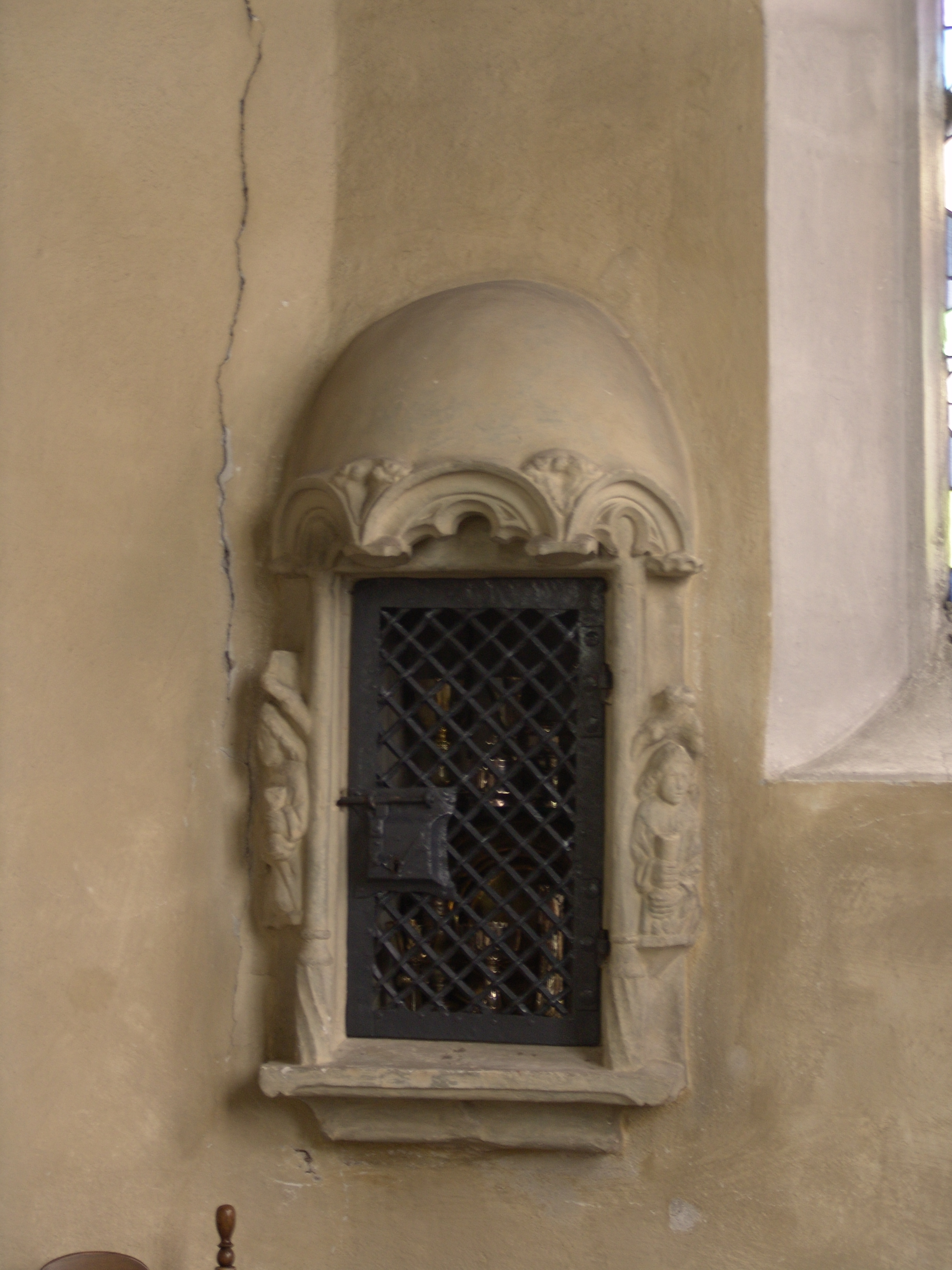 evang.-luth. Kirche St. Johannis in Gemünda, Sakramentsnische